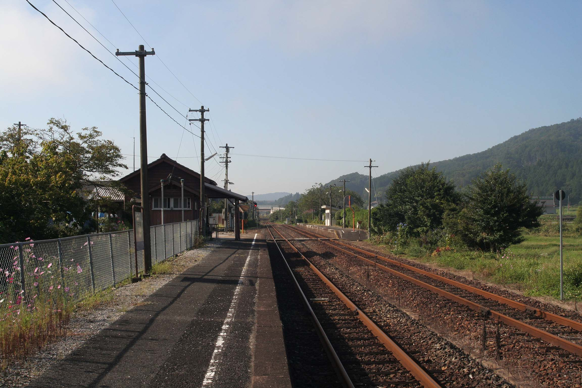 西日本旅客鉄道 矢神駅の構内